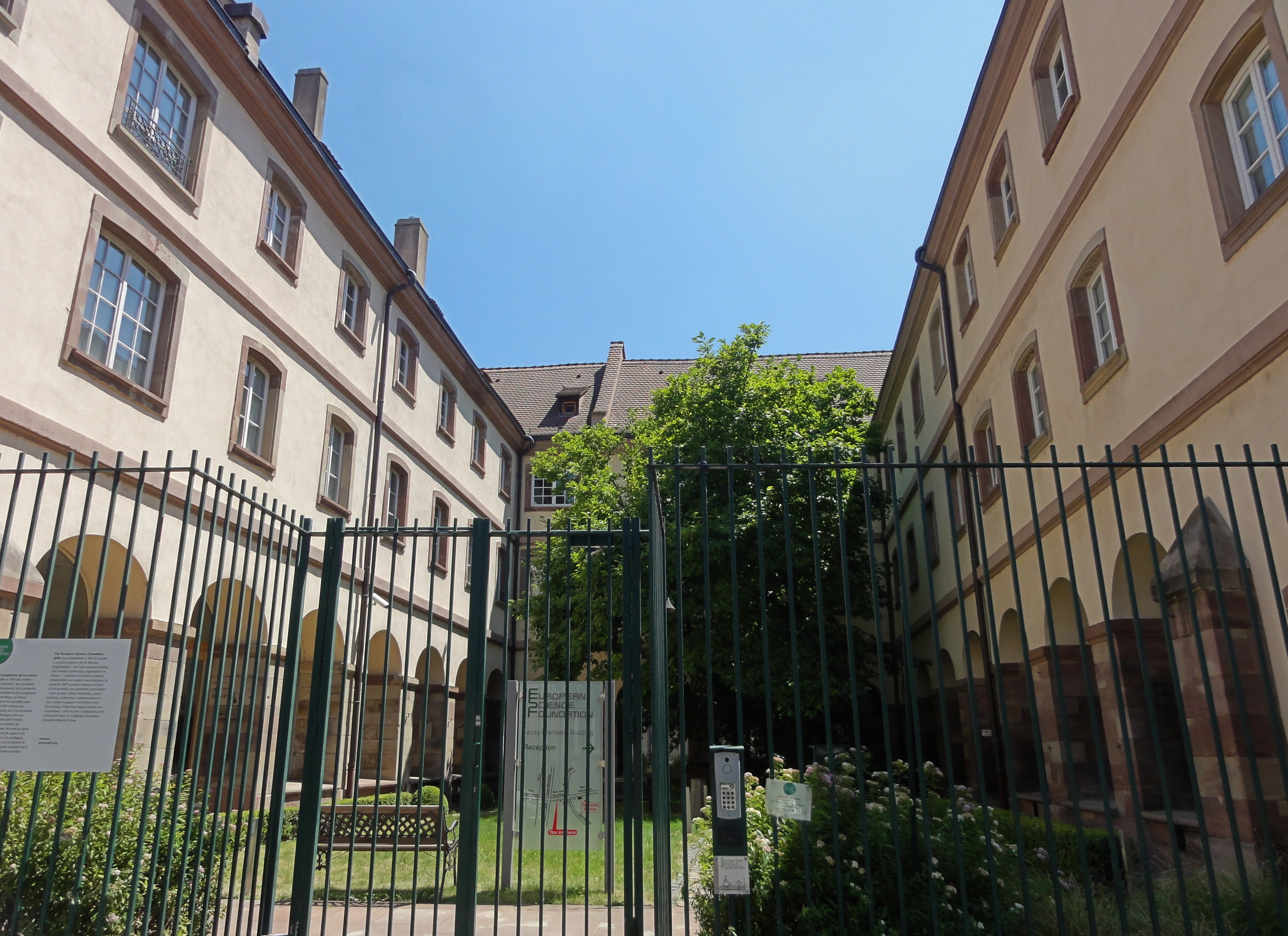 Alsace, Bas-Rhin, Strasbourg, Ancien Couvent des Récollets (1746), aujourd'hui Fondation européenne pour la Science, 1 quai Lezay-Marnésia.